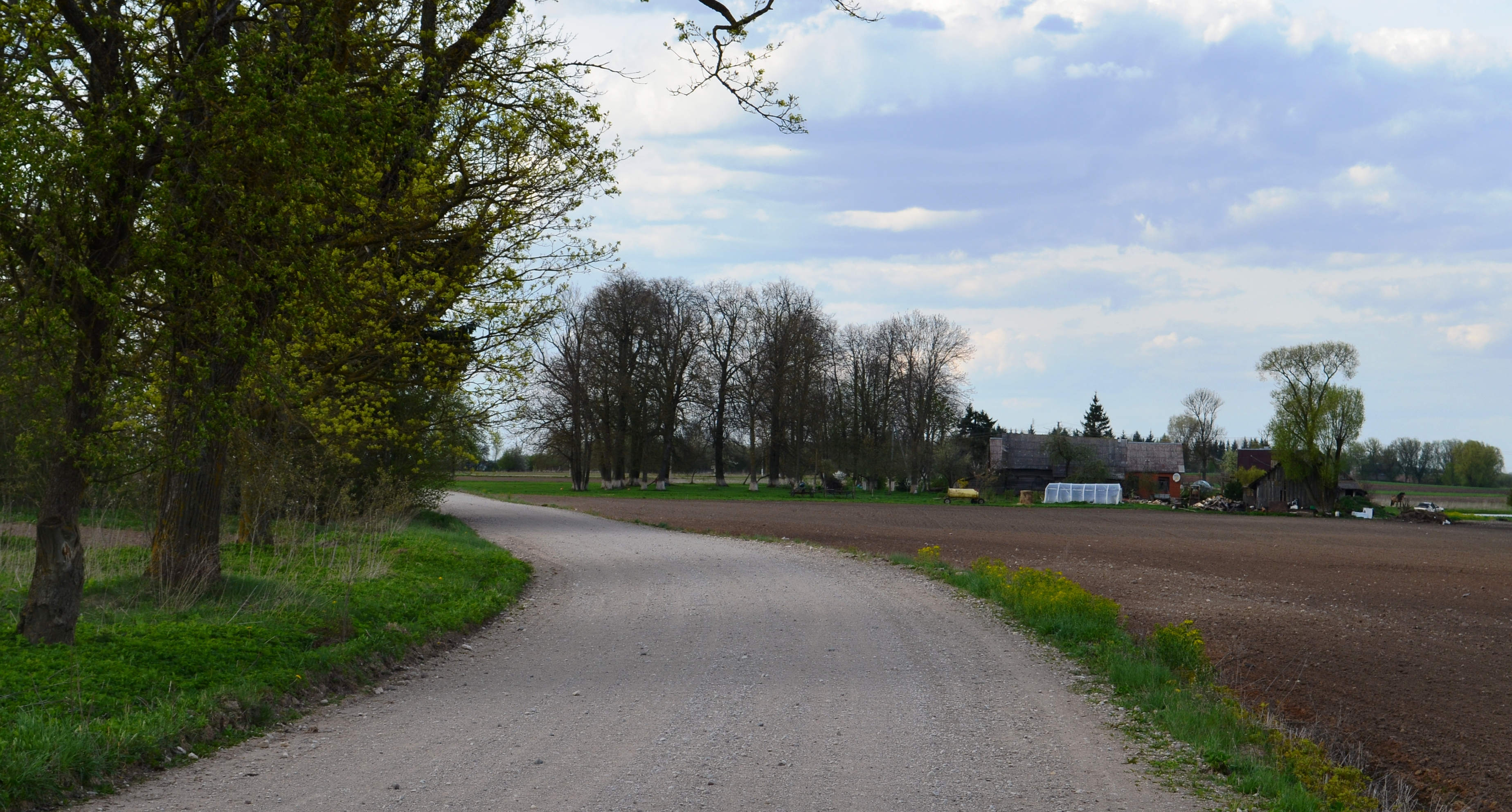 Glebauskų k., Panevėžio raj.